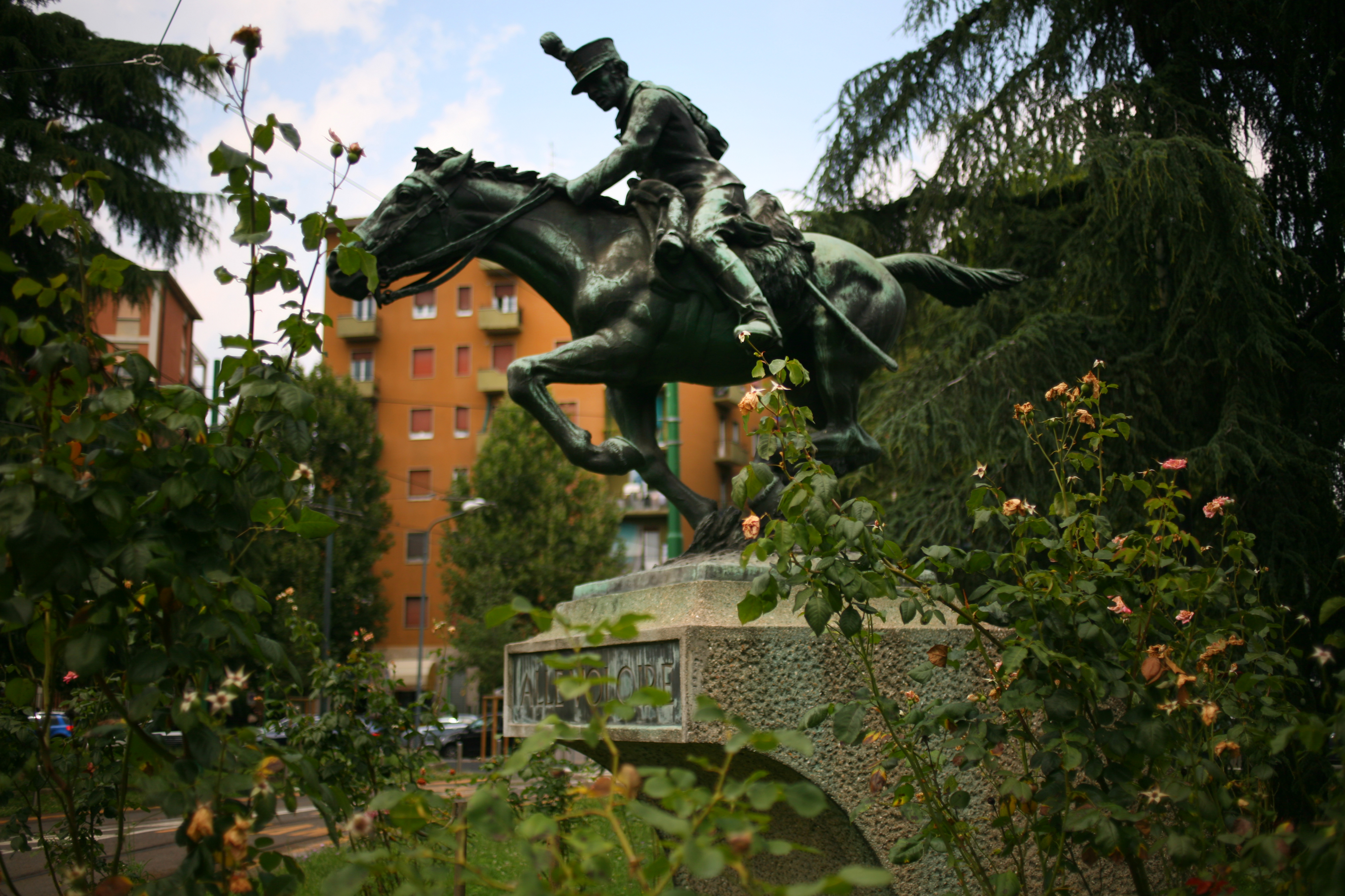 Monumento in bronzo con dedica "Alle Voloire" dello scultore Ambrogio Consonni, di fronte alla Caserma Santa Barbara di Milano